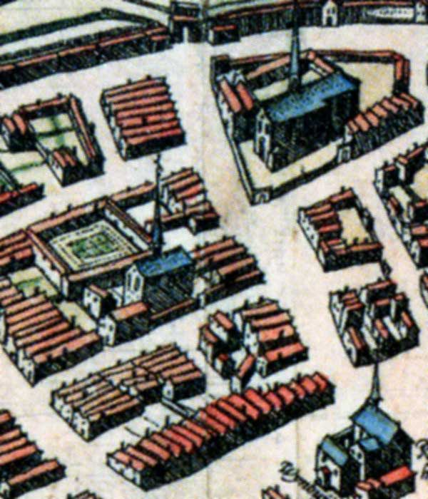 Detail van een plattegrond van Groningen uit de stedenatlas van Georg Braun en Frans Hogenberg 1575 met o.a. van boven naar beneden het Jacobijnerklooster, het Olde Convent en het Raadhuis